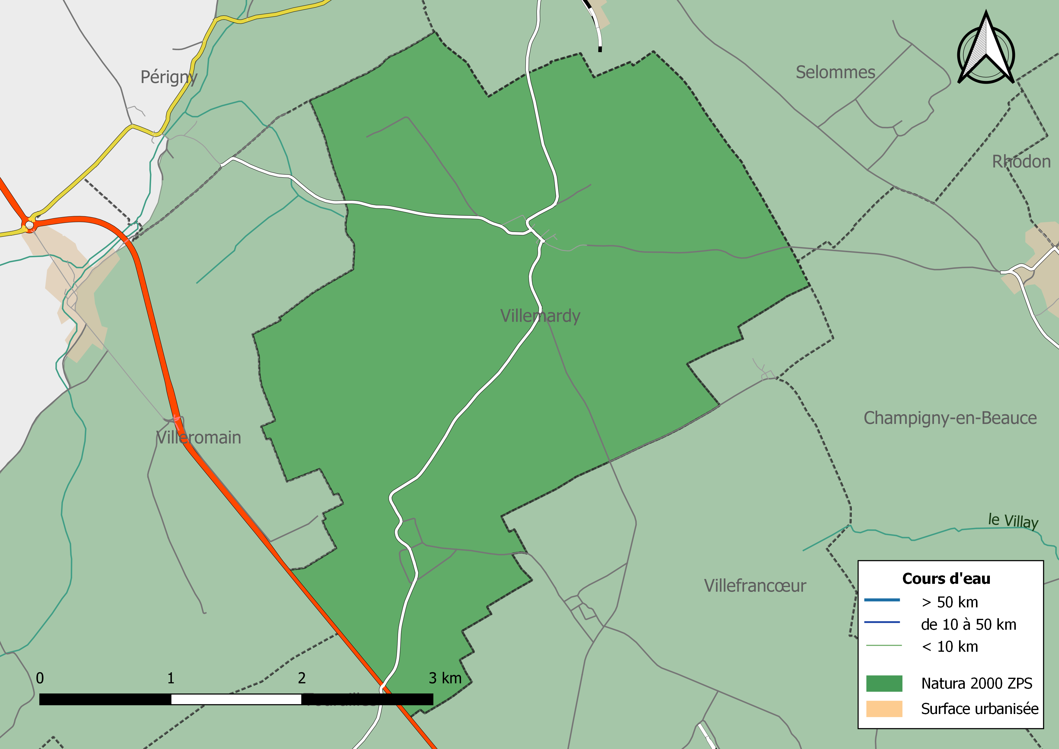 Carte du site Natura 2000 de type ZPS de la commune de Villemardy (France).